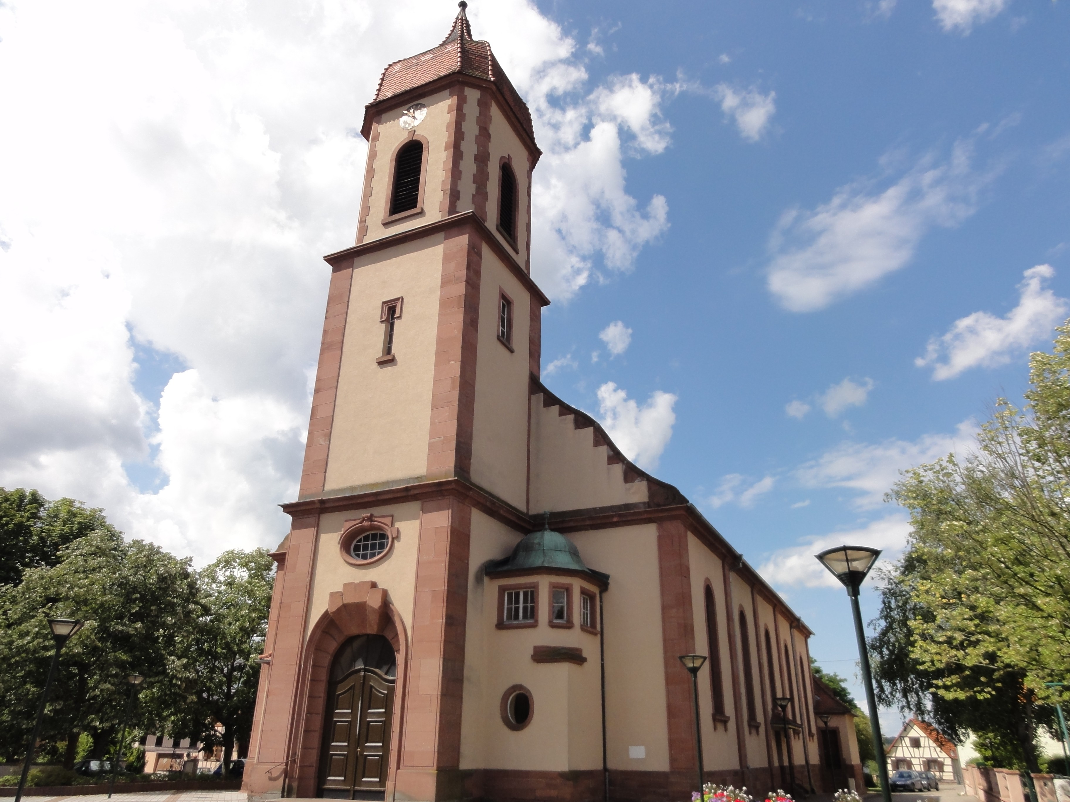 Alsace, Bas-Rhin, Église Saint-Barthélemy de Durrenbach (IA67007777).